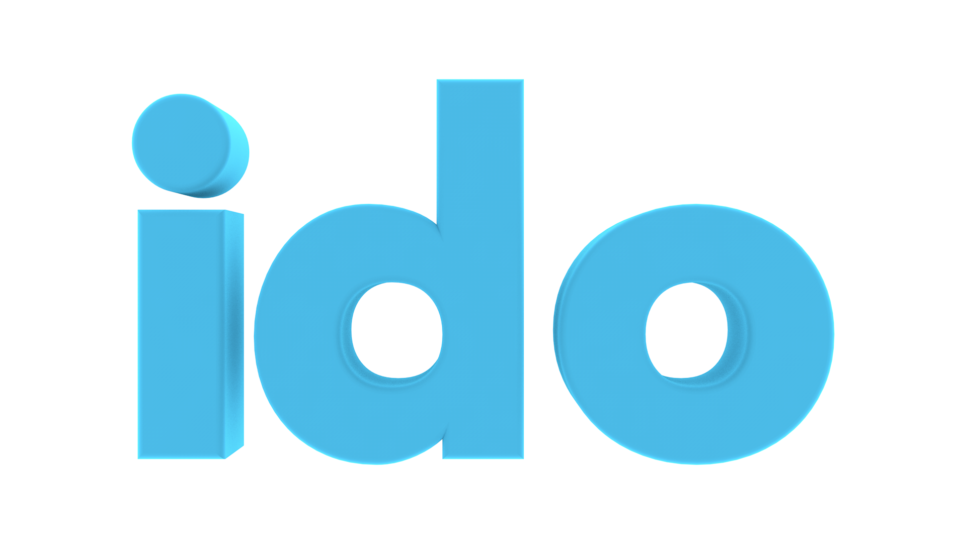 Ido: Ica esas mea Ido text-logo